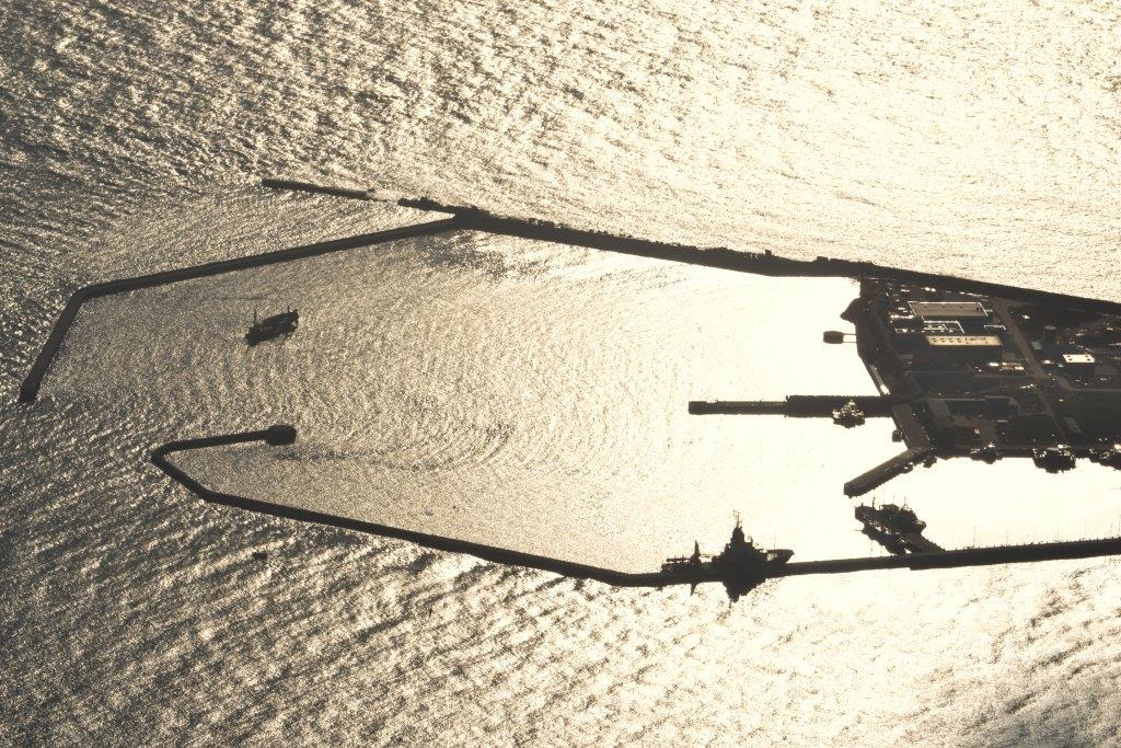 Luftaufnahme vom verwirklichten (westlichen) Teil der sog. Hummerschere, des projektierten Hafens der Kriegsmarine, am Südende von Helgoland; aufgenommen aus dem Heißluftballon des Hamburger Kapitäns Franz Taucher